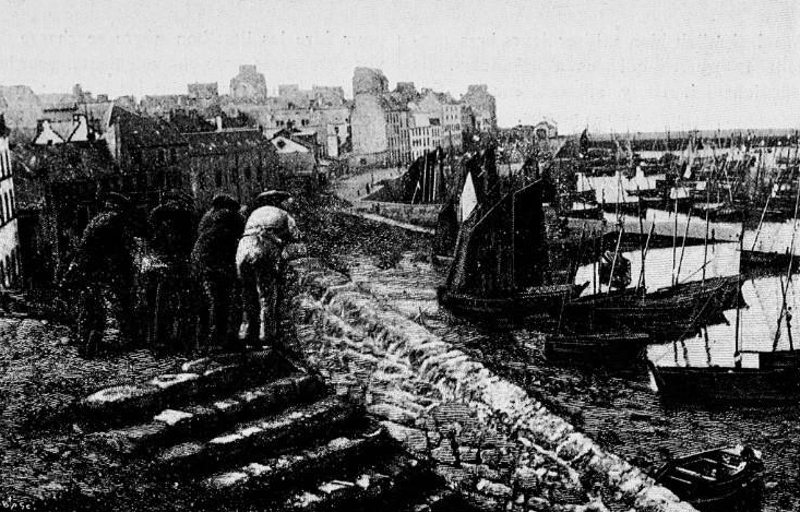 Le port de Douarnenez en 1902 (Yan de La Noët, Le mois littéraire et pittoresque, 1902)